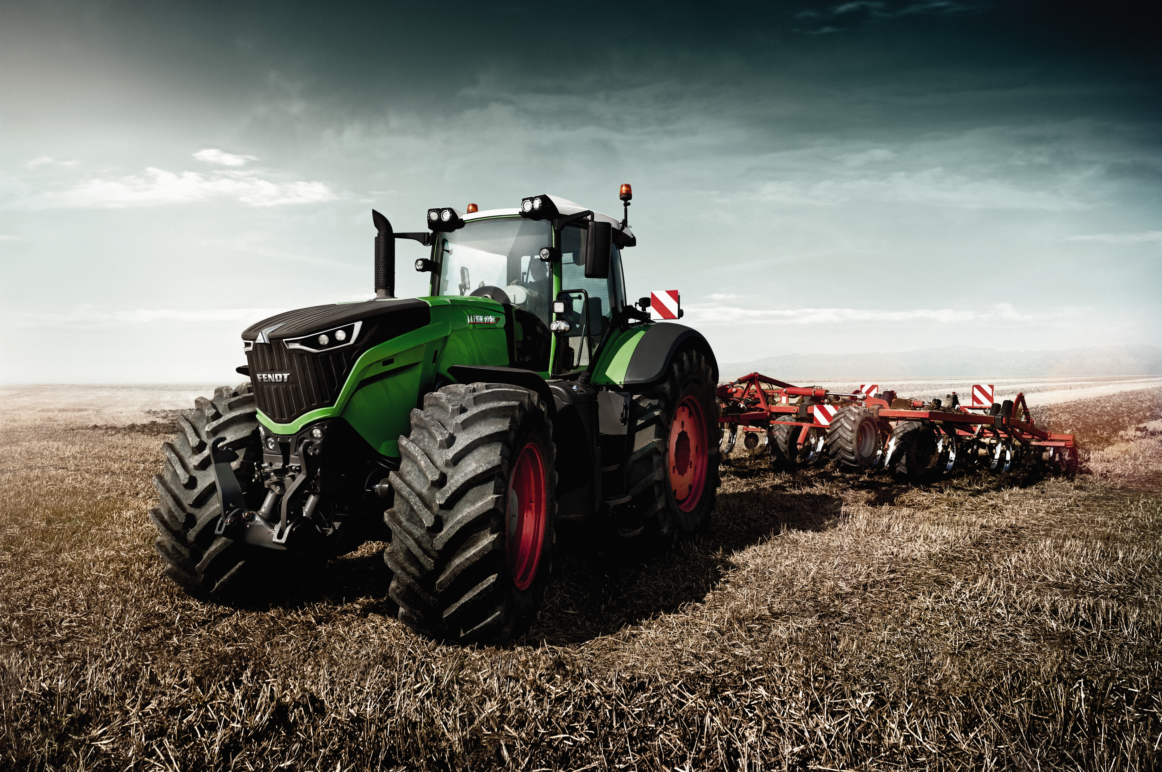 Fendt 1000 Vario mit Anbaupflug